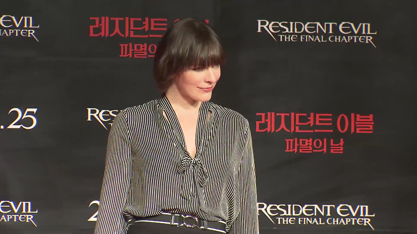 영화 '레지던트 이블:파멸의 날' 밀라 요보비치 내한